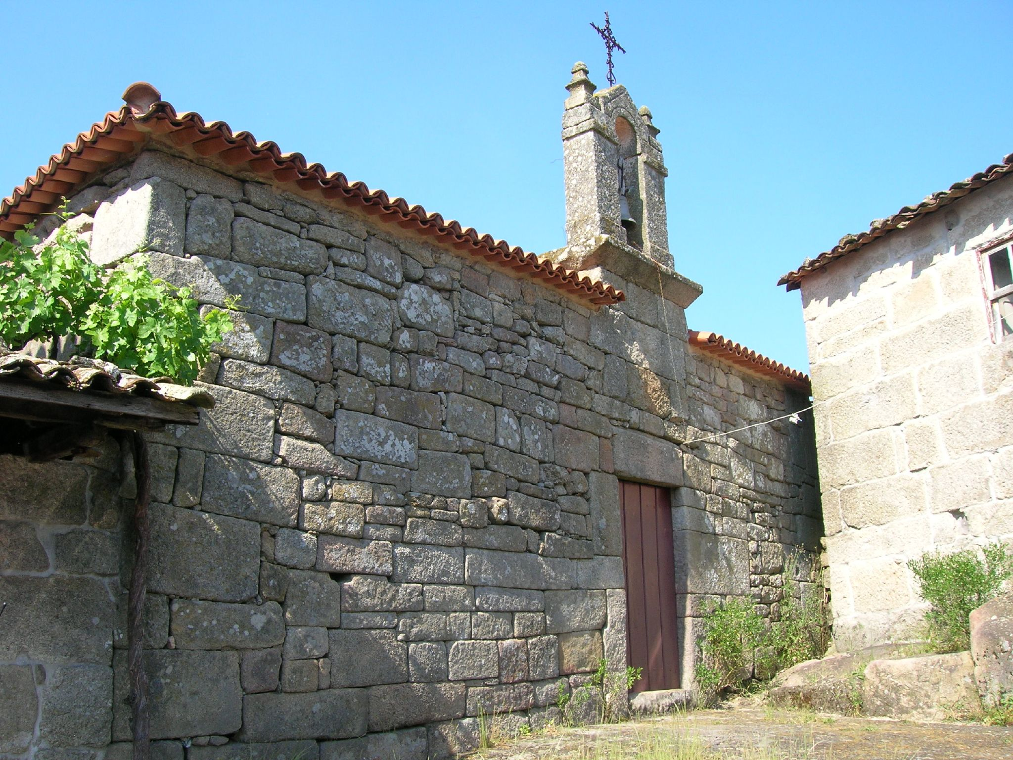 Iglesia prerrománica del siglo IX, de planta basilical y cabecera triple de ábsides rectos. El acceso se encuentra en el muro sur, que comunicaba con la nave meridional, que estaba separada de la central mediante arcos de herradura sobre gruesos pilares cuadrados.